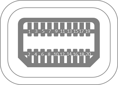 Conector Thunderbolt com pinagem numerada.